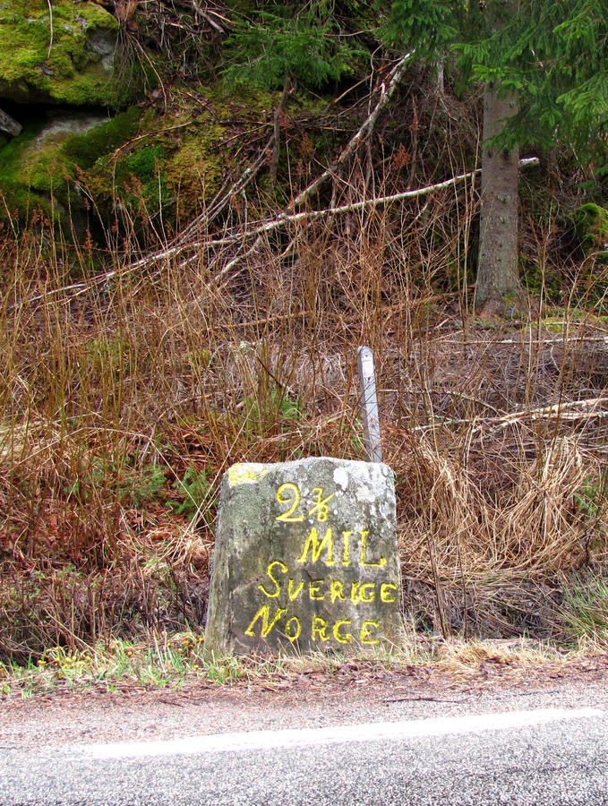 Oude grenssteen op de noors-zweedse grens aan Fylkesvei 106 (N), tussen Bjørkebekk in Aremark en Stommen in Nössemark/Dals-Ed.